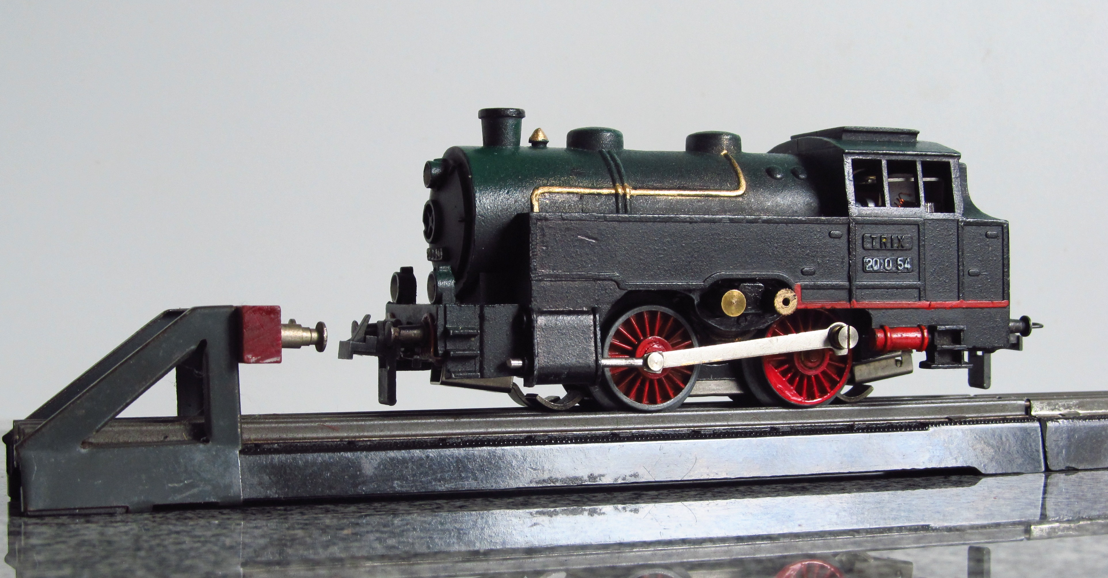 Trix Express Wechselstromlokomotive Baureihe 20/54 (Vorkrieg)